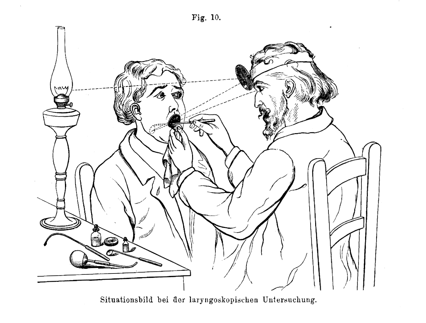 Laryngoskopie